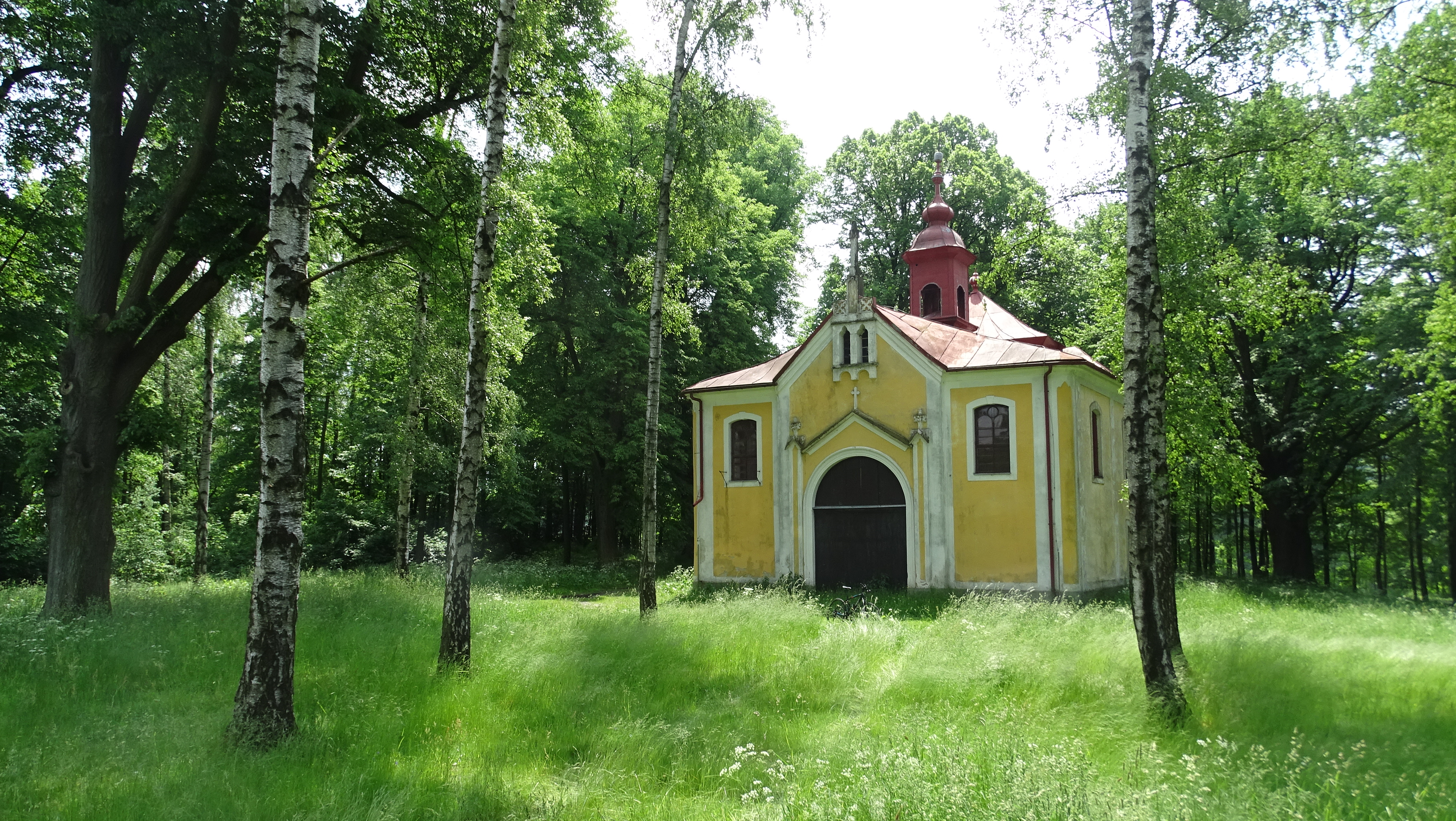 Wallfahrtapelle der Heiligen Anna auf dem Annaberg